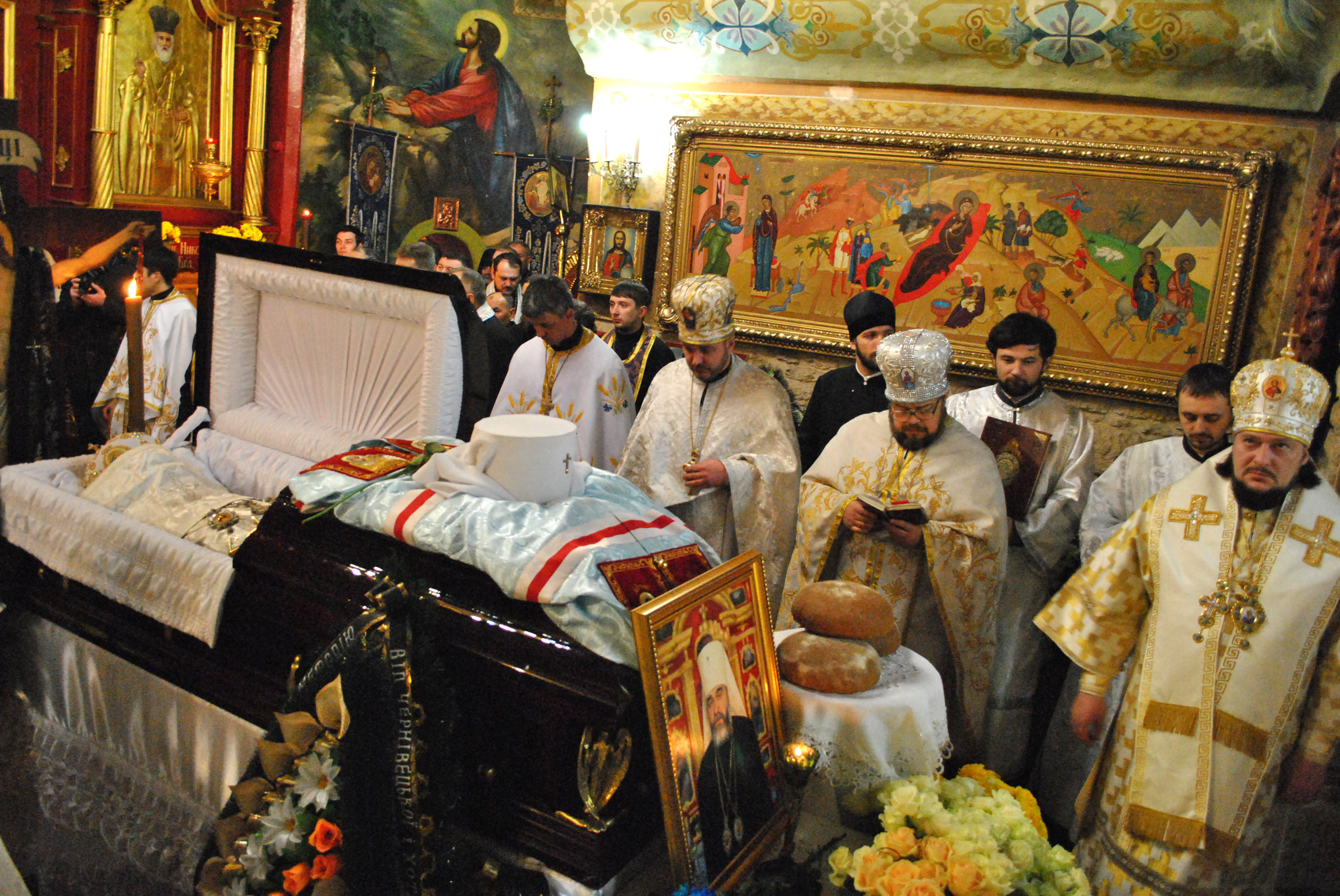 Похорон предстоятеля Української автокефальної православної церкви, Митрополита Київського і всієї України Мефодія в церкві Різдва Христового (м. Тернопіль).